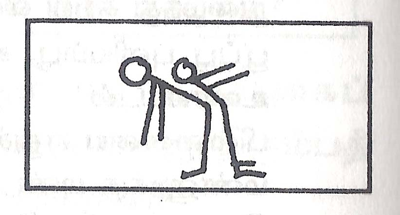 மச்சிலே யாரு விளையாட்டில் ஒருவர் முதுகில் மற்றொருவர் சாய்தல். மறைகின்ற விளையாட்டுகள் என்னும் எனது நூலிலிருந்து எடுத்துப் பதிவேற்றப்பட்டுள்ளது